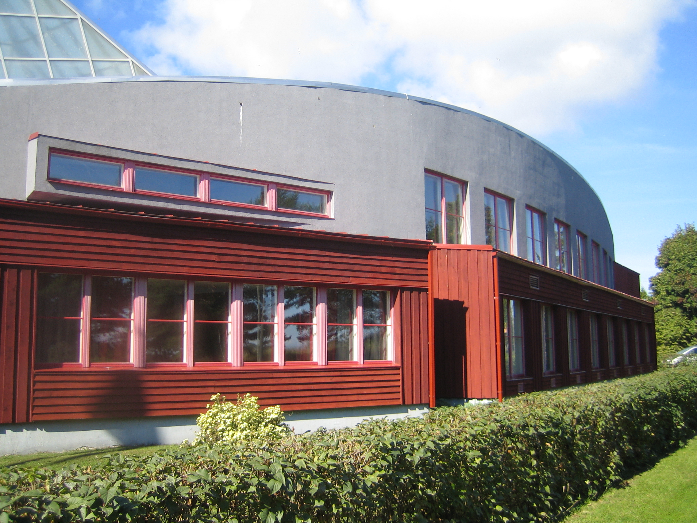 Kihnu rahvamaja